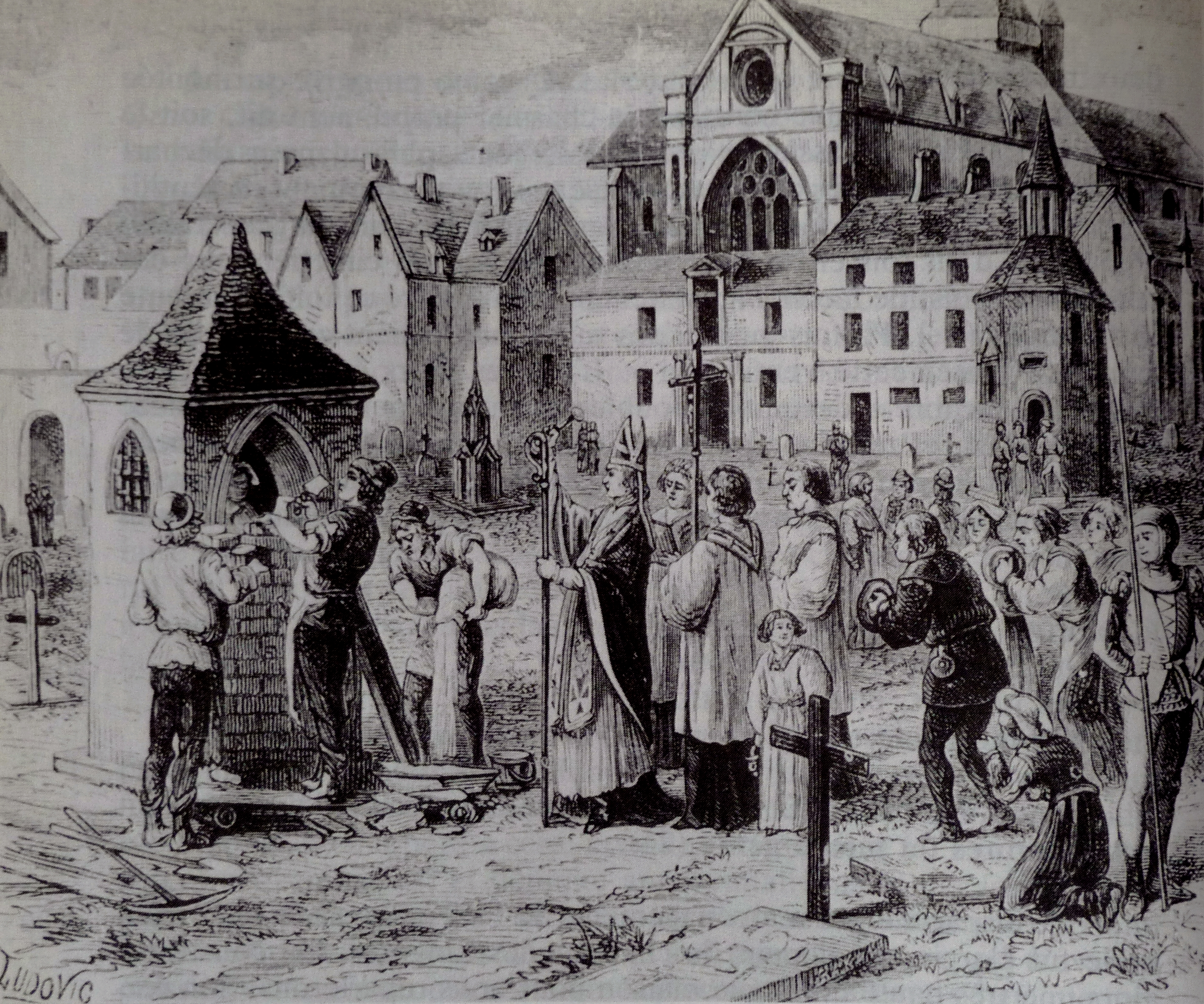 Gravure représentant un reclusoir et l'emmurement d'une recluse. Signature Ludovic, origine non déterminée, vers 1900 (?). Légende : isolement d'une recluse sous la bénédiction de l'évêque.